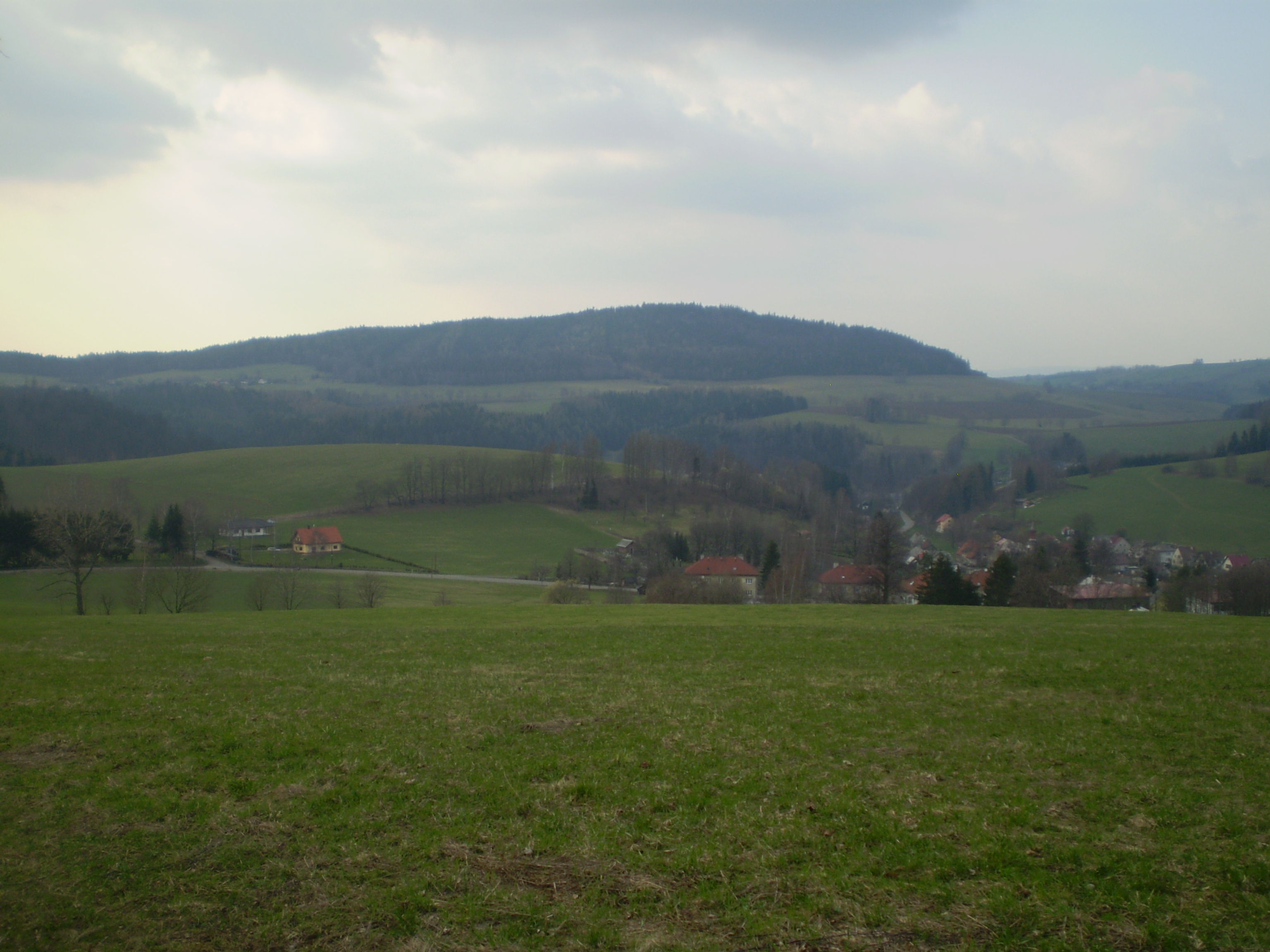 Studený, Orlické hory